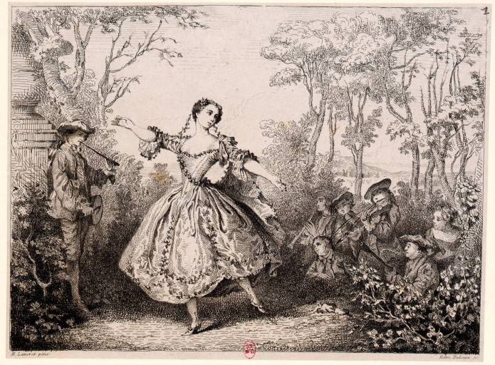 Portrait of Marie-Anne Cupis de Camargo (1710-1770)